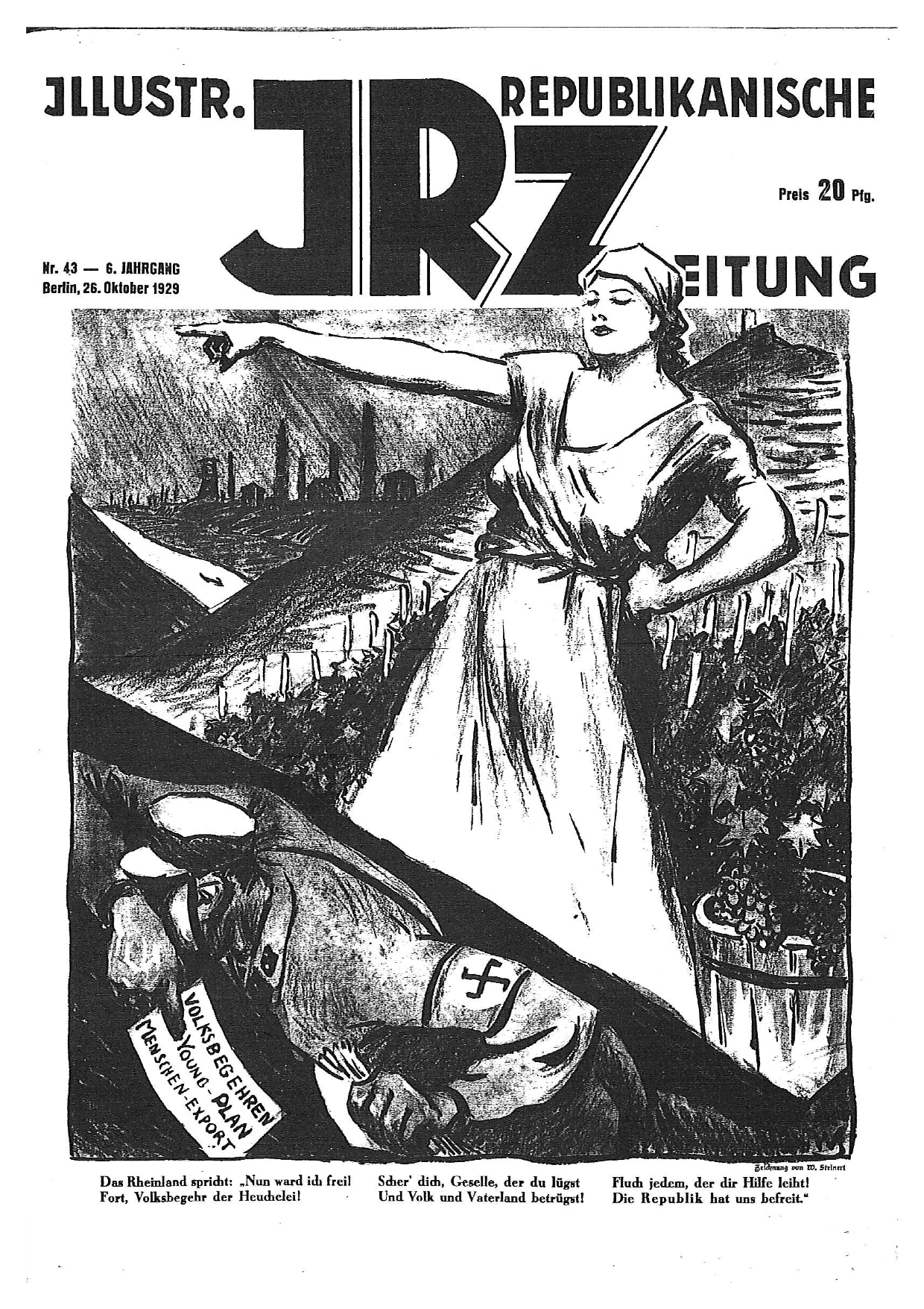 Titelseite der 43. Ausgabe der Illustrierten Republikanischen Zeitung, Jahrgang 1929